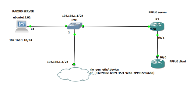 Монгол: AAA сервэрийг PPPoE сервэртэй ажиллуулах